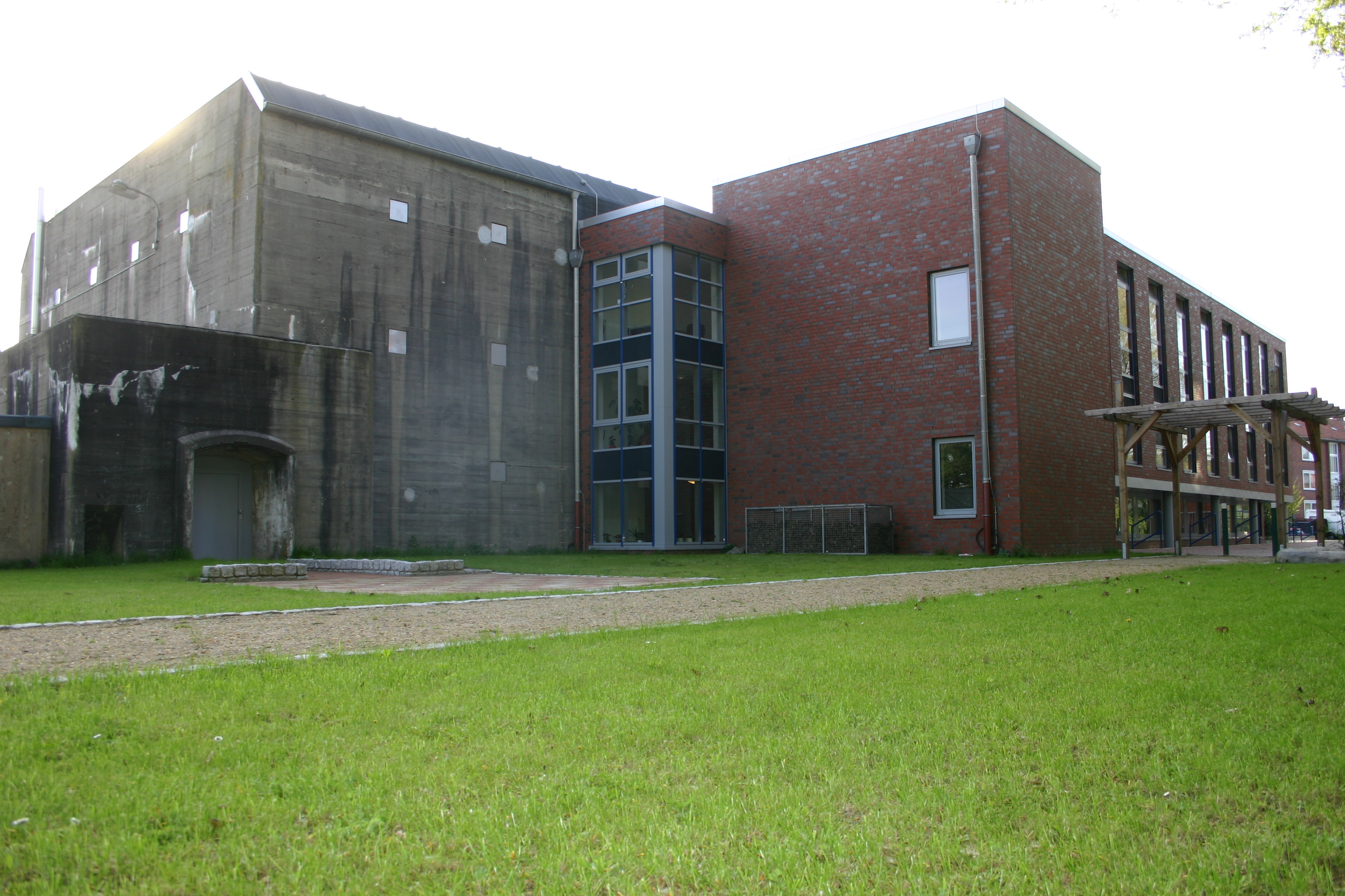 Der Kulturbunker im Emder Stadtteil Barenburg, Rückseite